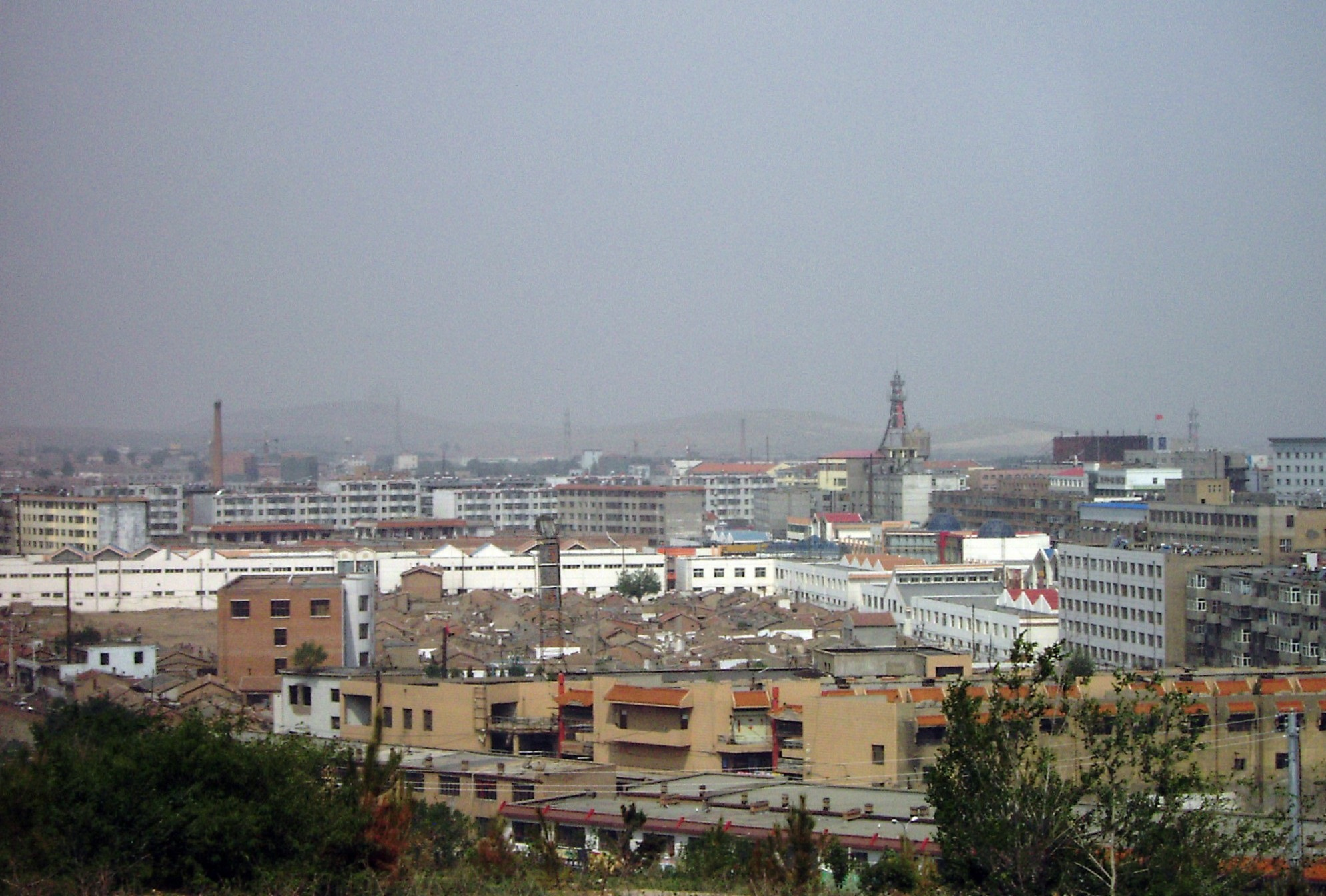 远望